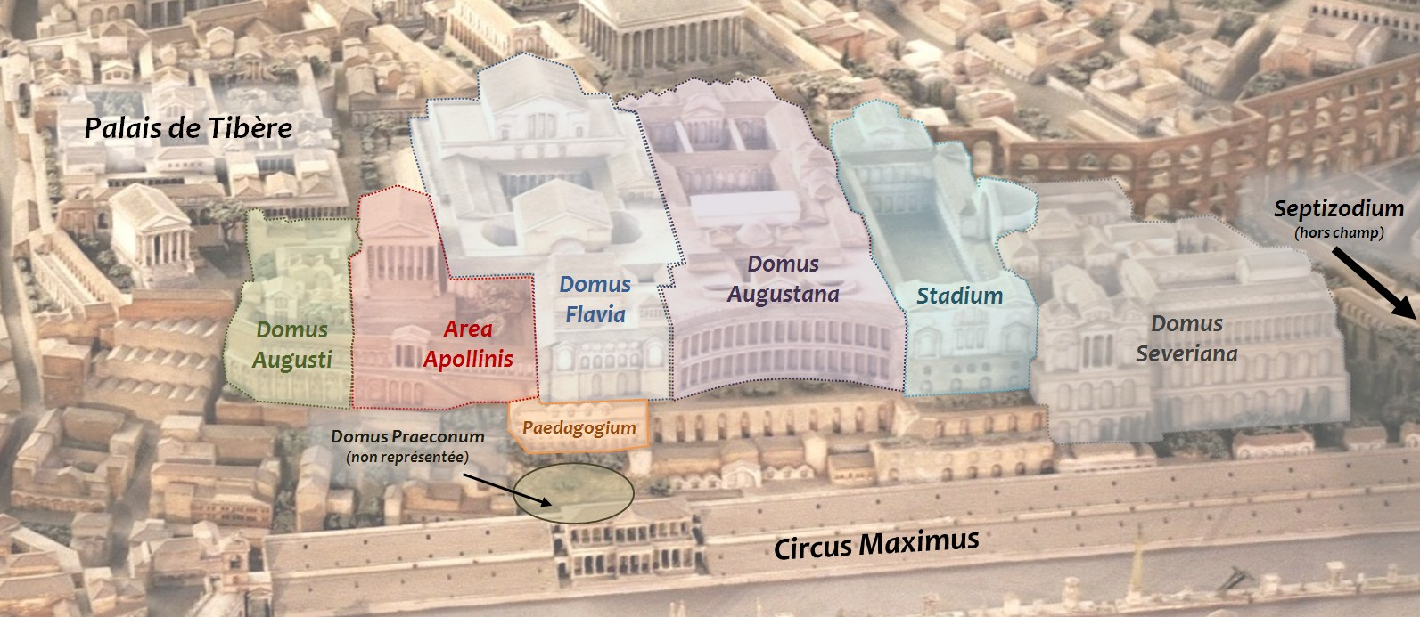 Palatin, localisation des différentes sections du palais impérial.